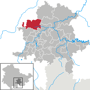 Rottenbach in Thuringia - District Saalfeld-Rudolstadt